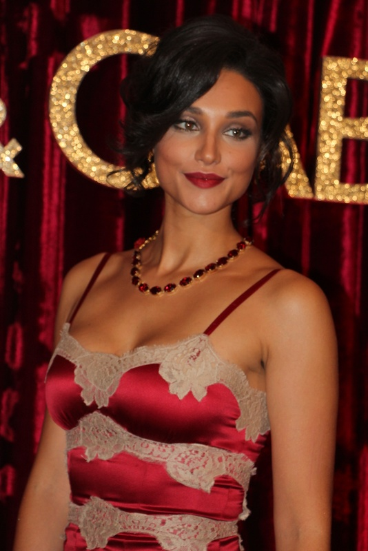 Debora Nascimento-001